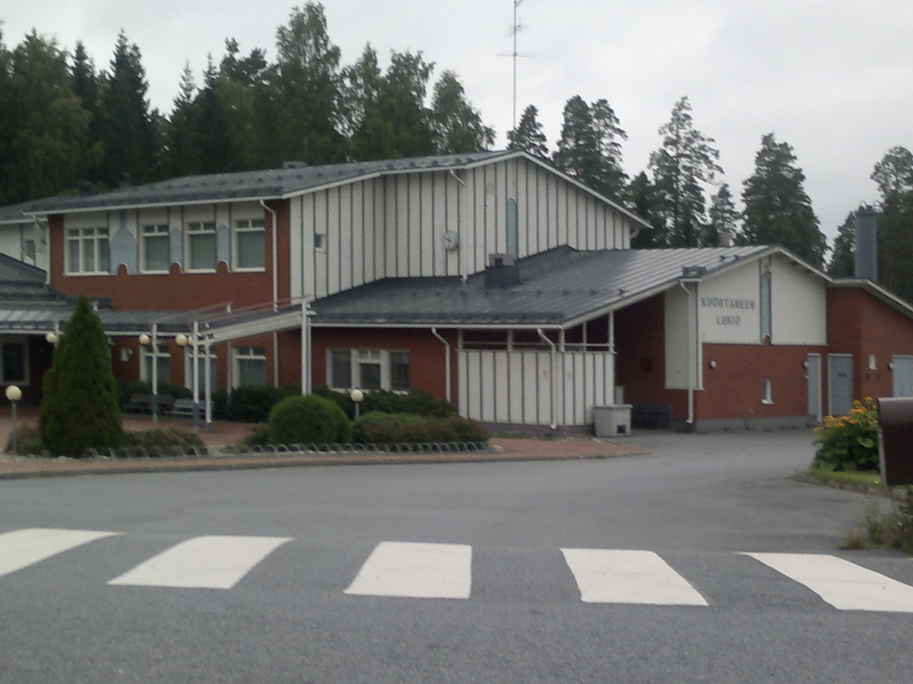 Kuortaneen lukio